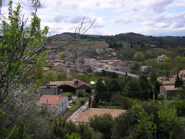 Vue du village Saint Hilaire de l'Aude